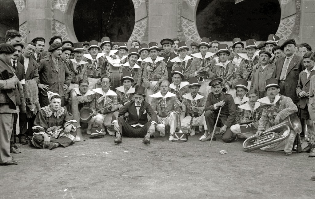 Título original: Actuación de la banda 'El Desastre de Umore Ona' de Tolosa, durante la becerrada de Euskal Billera, en la plaza de toros de 'El Txofre' (2/2) Localización: San Sebastián (Guipúzcoa)